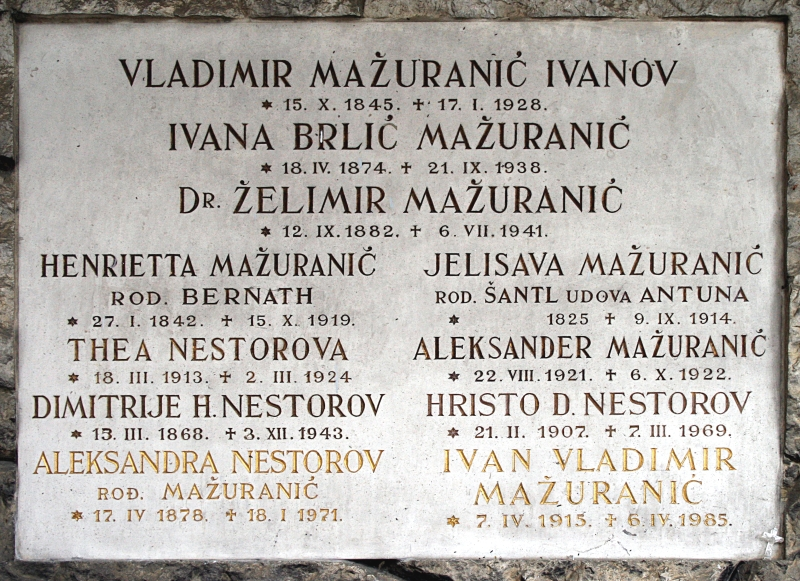 grob obitelji Mažuranić na Mirogoju